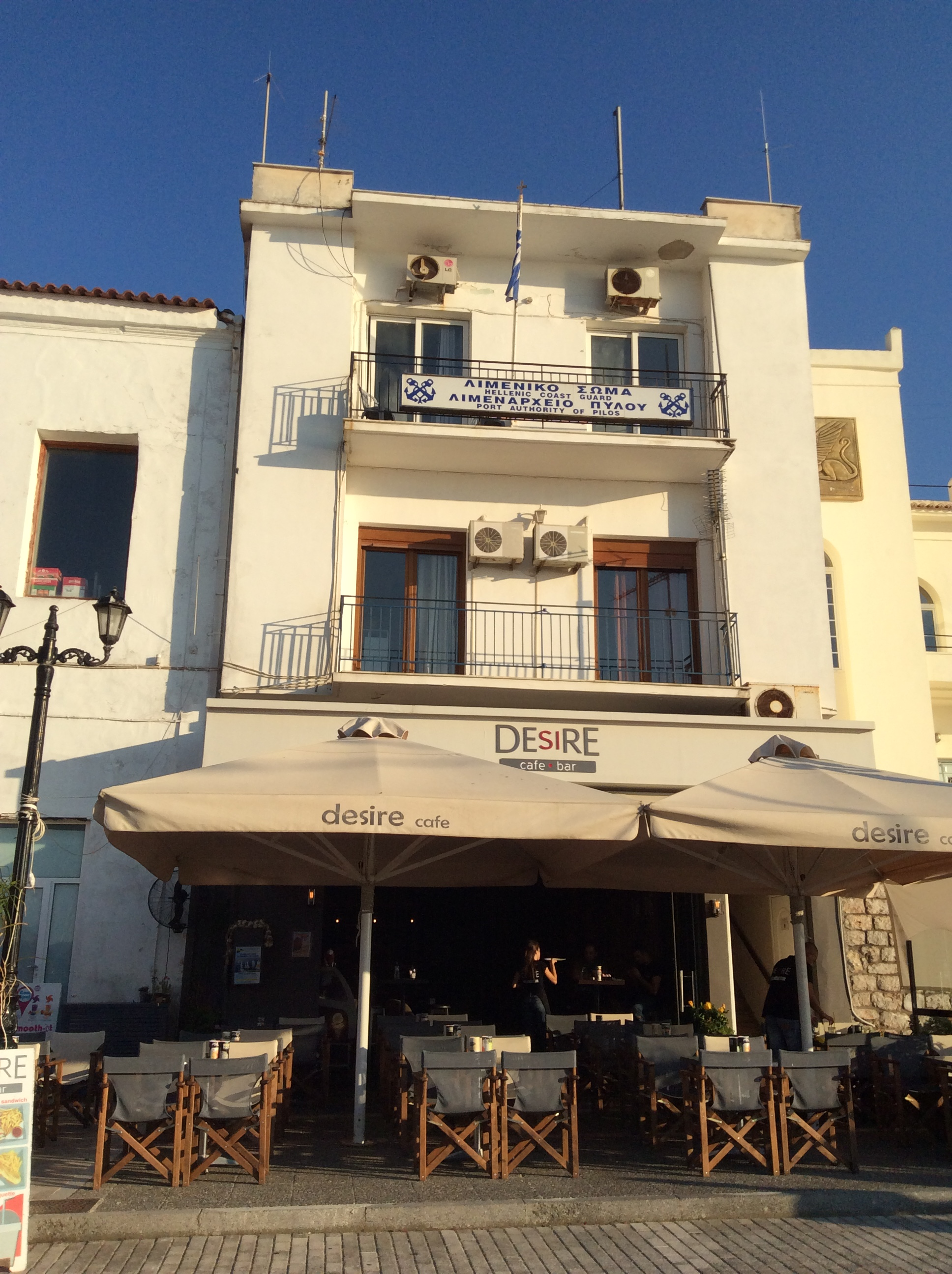 Το Λιμεναρχείο της Πύλου.